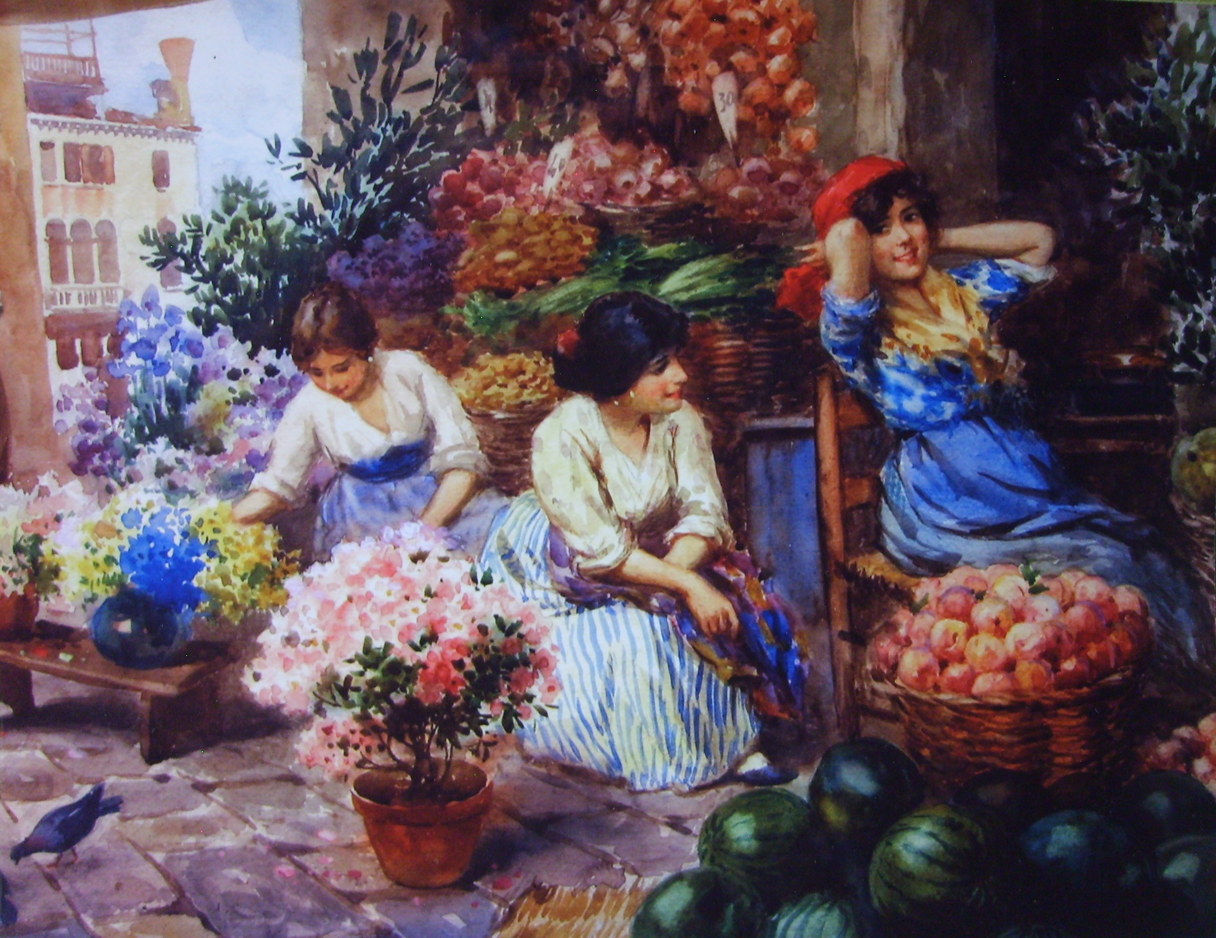 Acuarela de la Escuela Española, s XX. Museo Bello, en la Ciudad de Puebla, estado de Puebla, México.